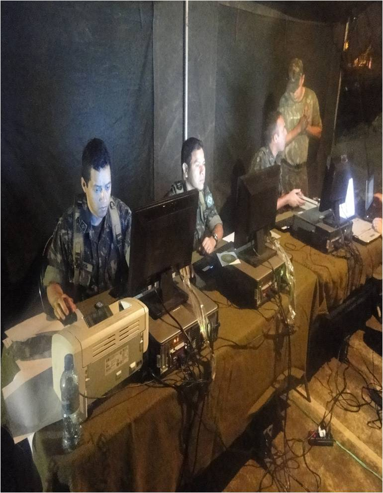 PC na Operação Angra 2013